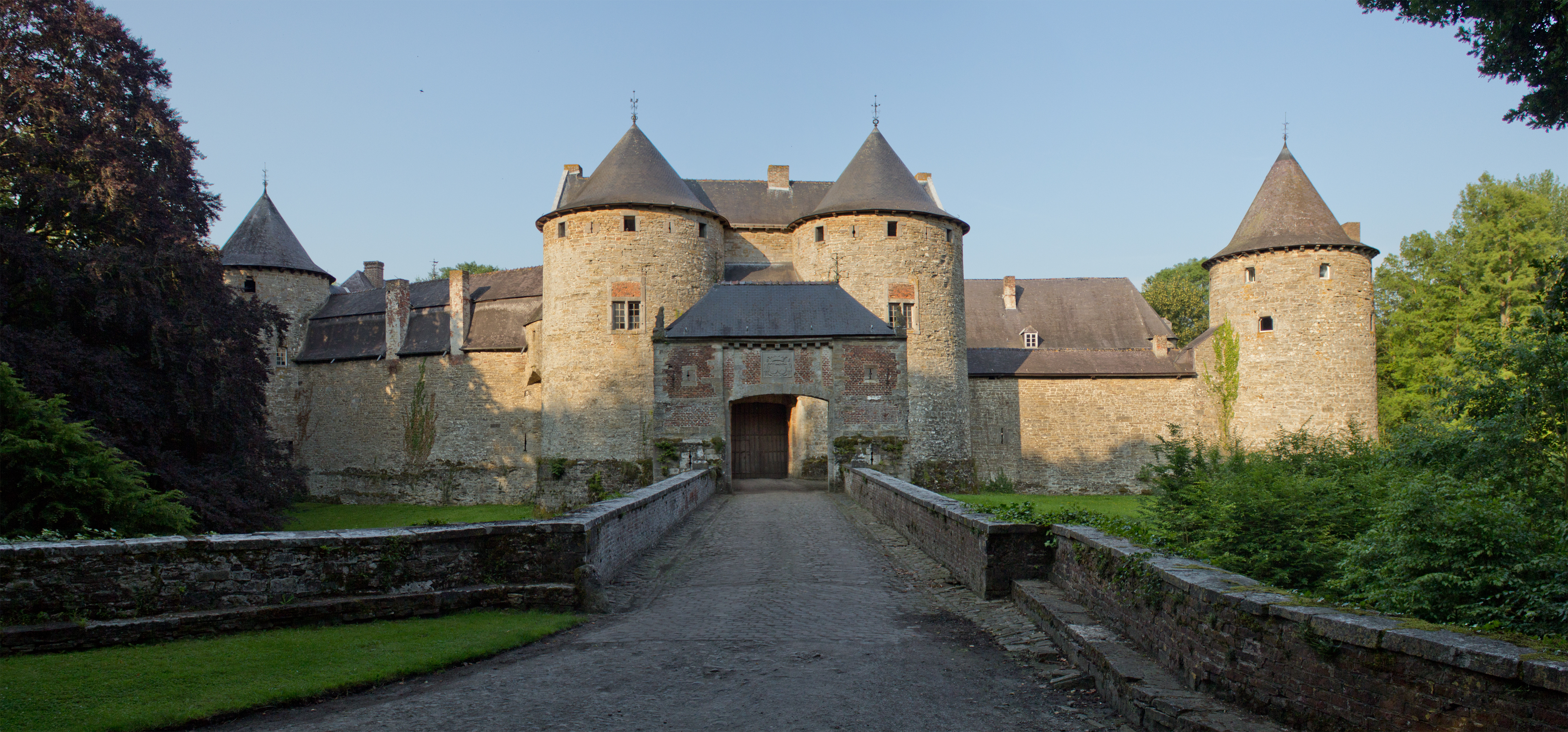 Le château de Corroy-le-Château.